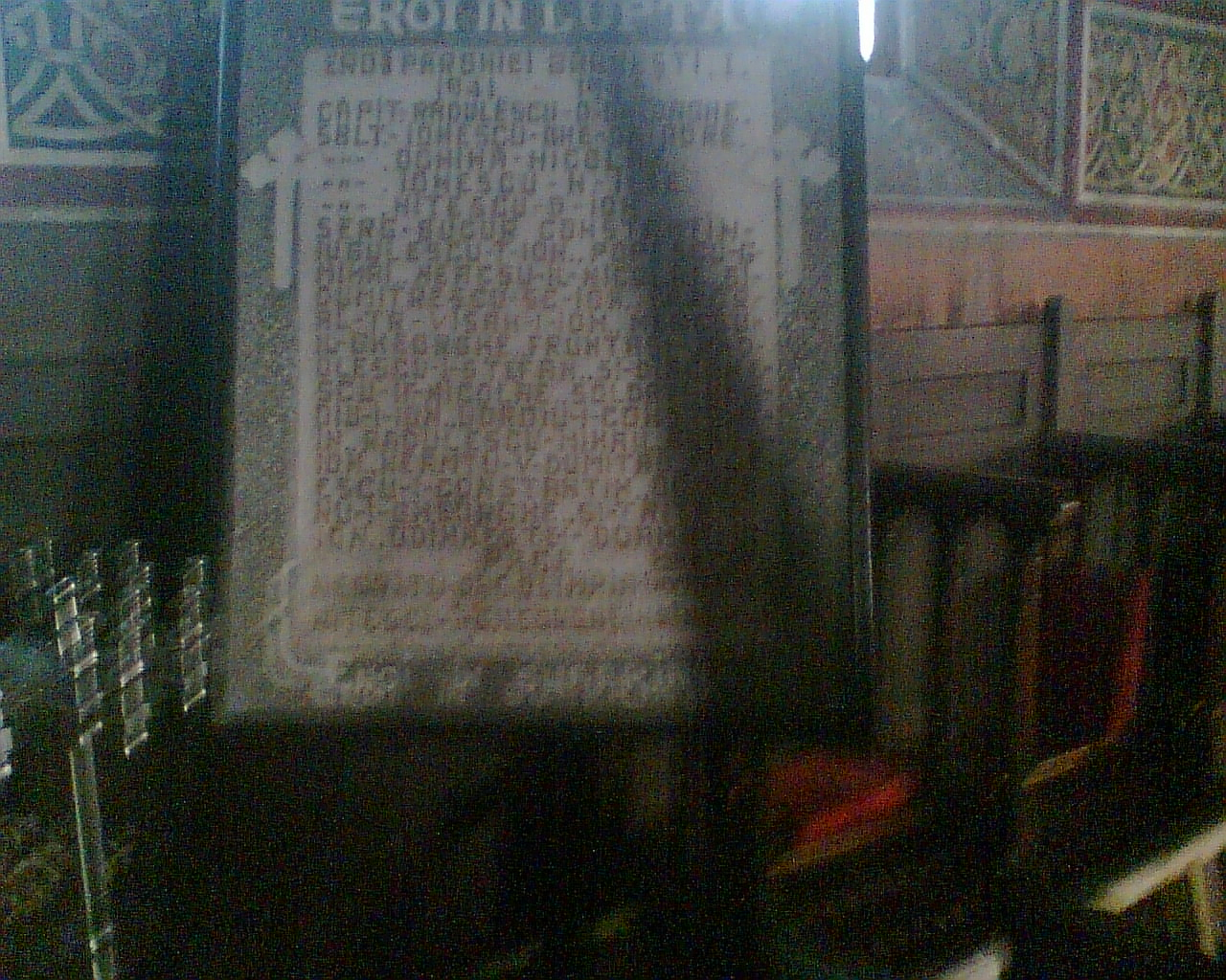 Piatra comemorativa dedicata ostasilor cazuti in Al Doilea Razboi Mondial 1940-1945